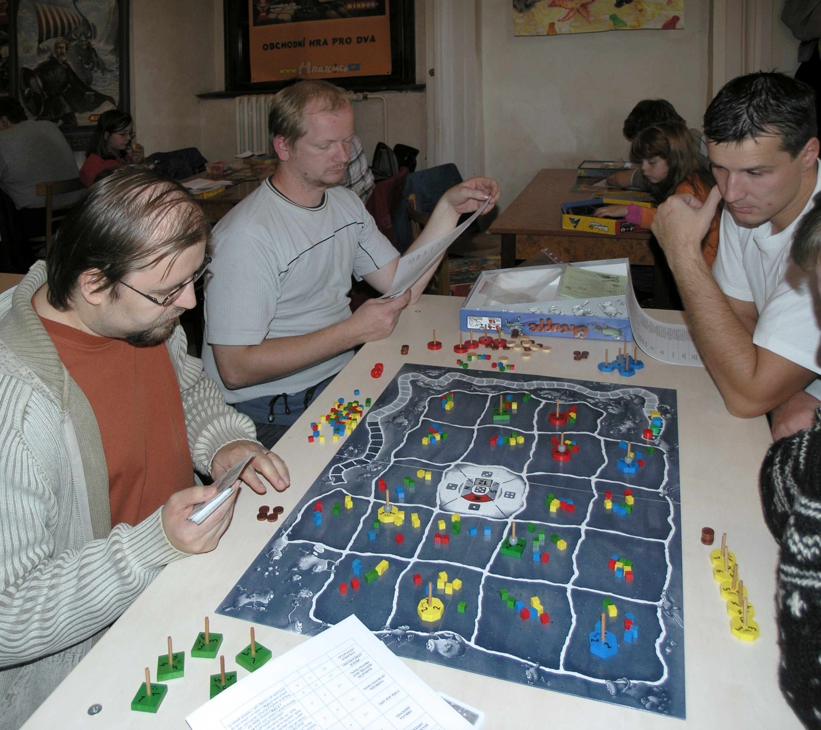 Deskohraní 2008